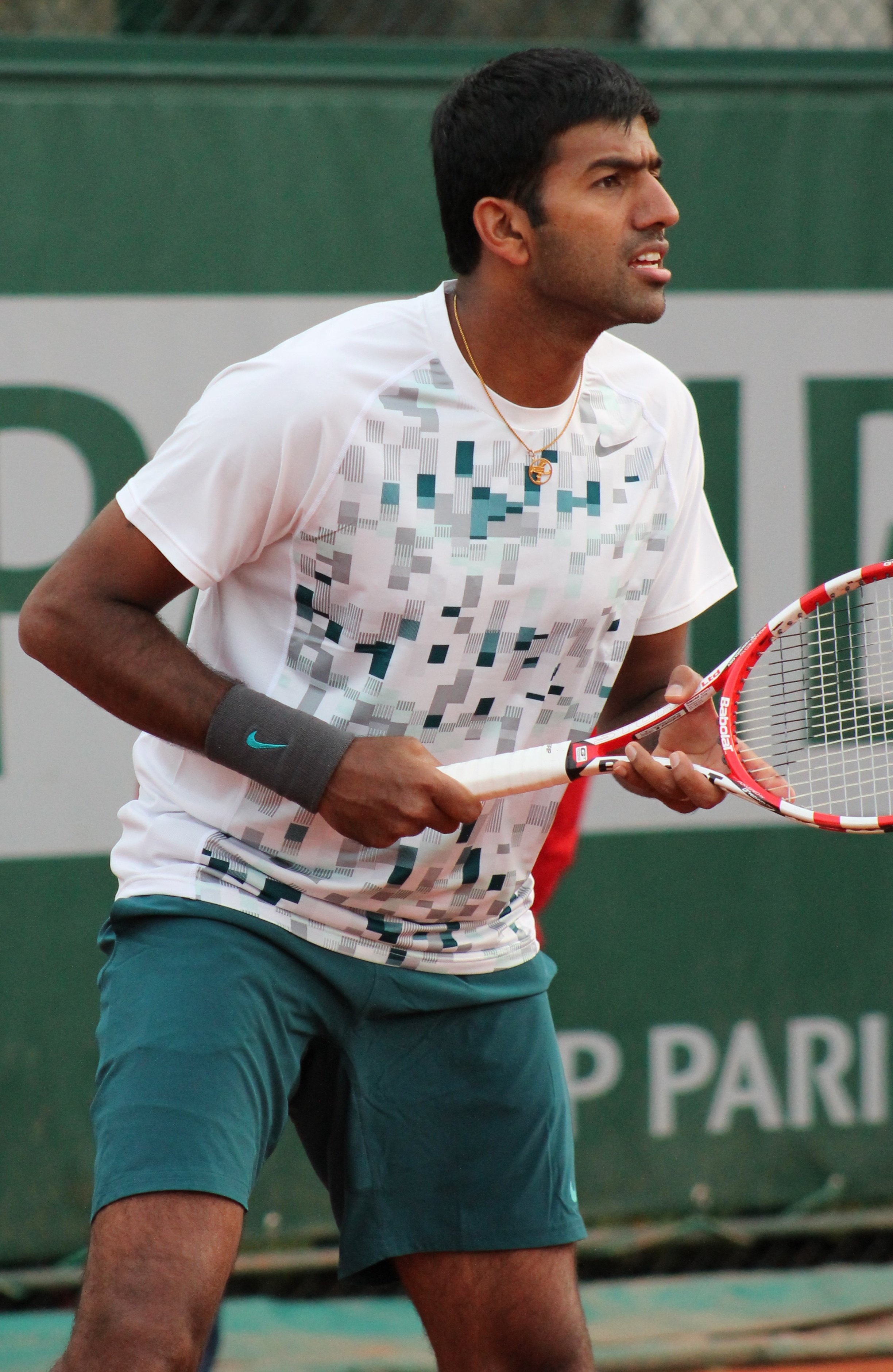 Bopanna RG13 (3)